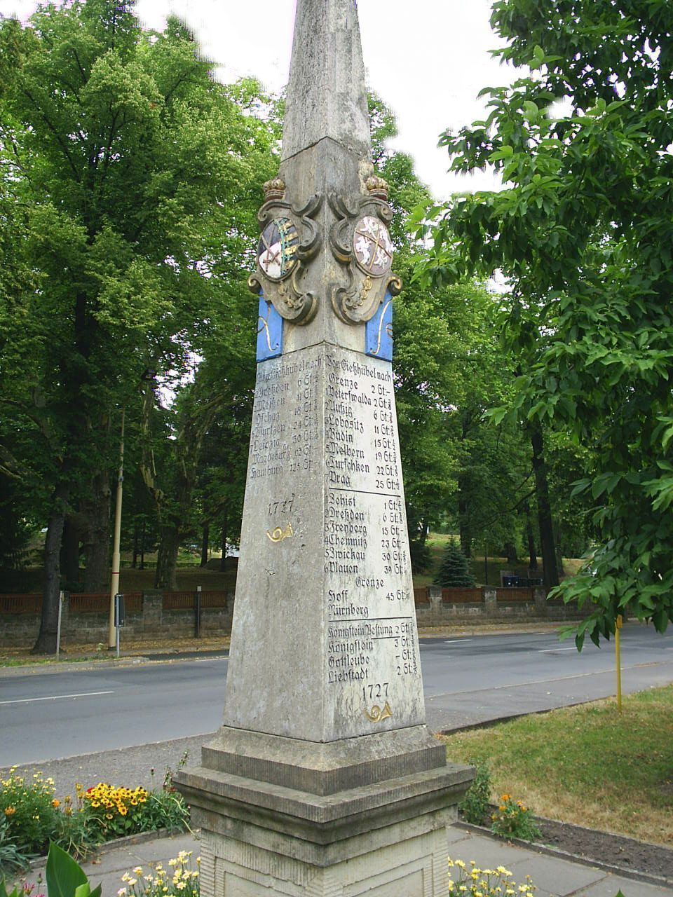 Saxon Milestone in Berggießhübel, Saxony, Germany